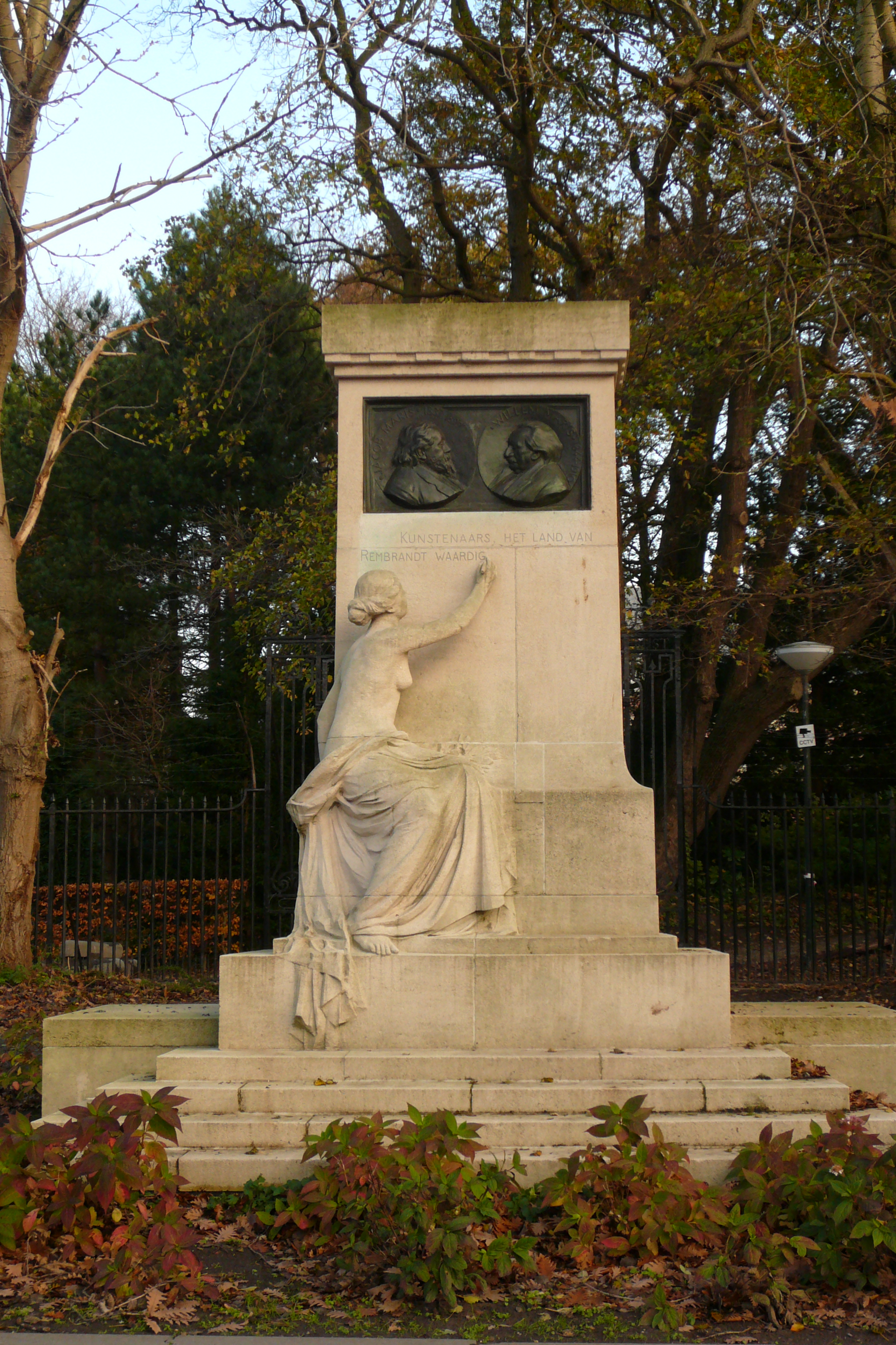 Maris monument Den Haag/The Netherlands